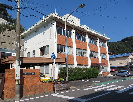 対馬振興局上県土木出張所